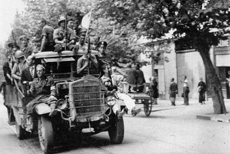 Gli insorti di Napoli festeggiano la liberazione Foto scattata da oltre 20 anni in Italia, copyright scaduto